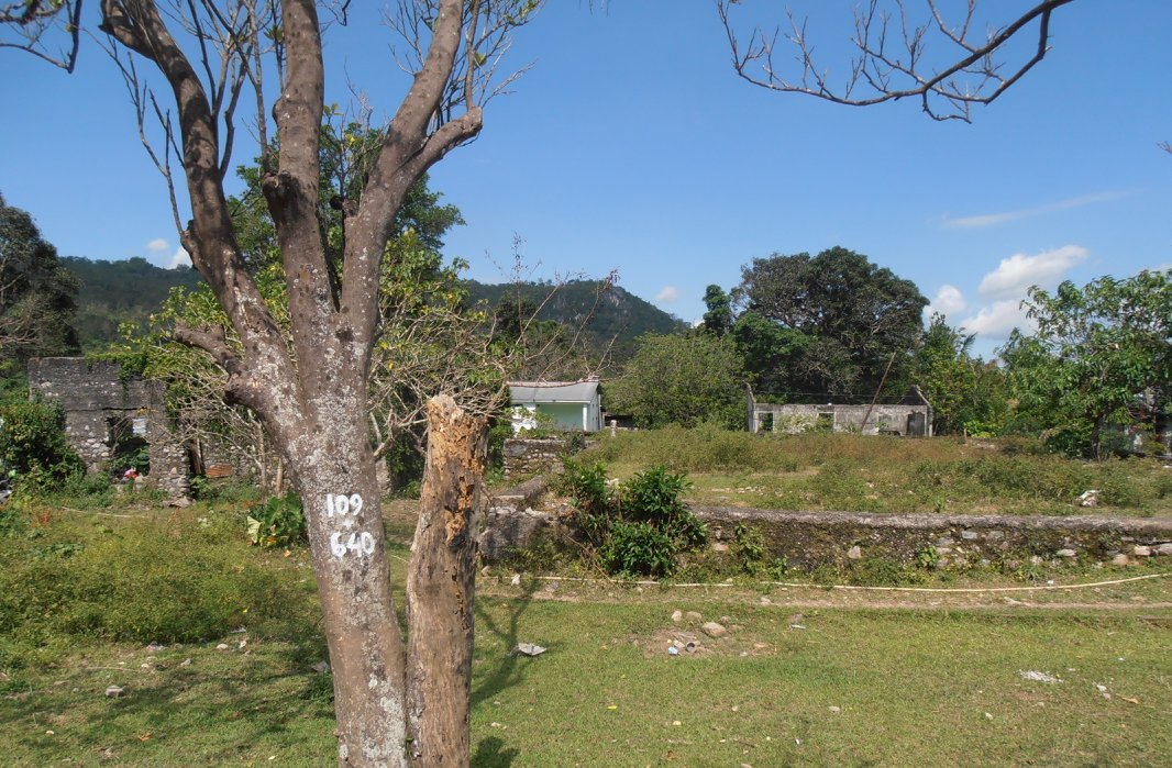 Ruinen der Residenz von Dom Aleixo